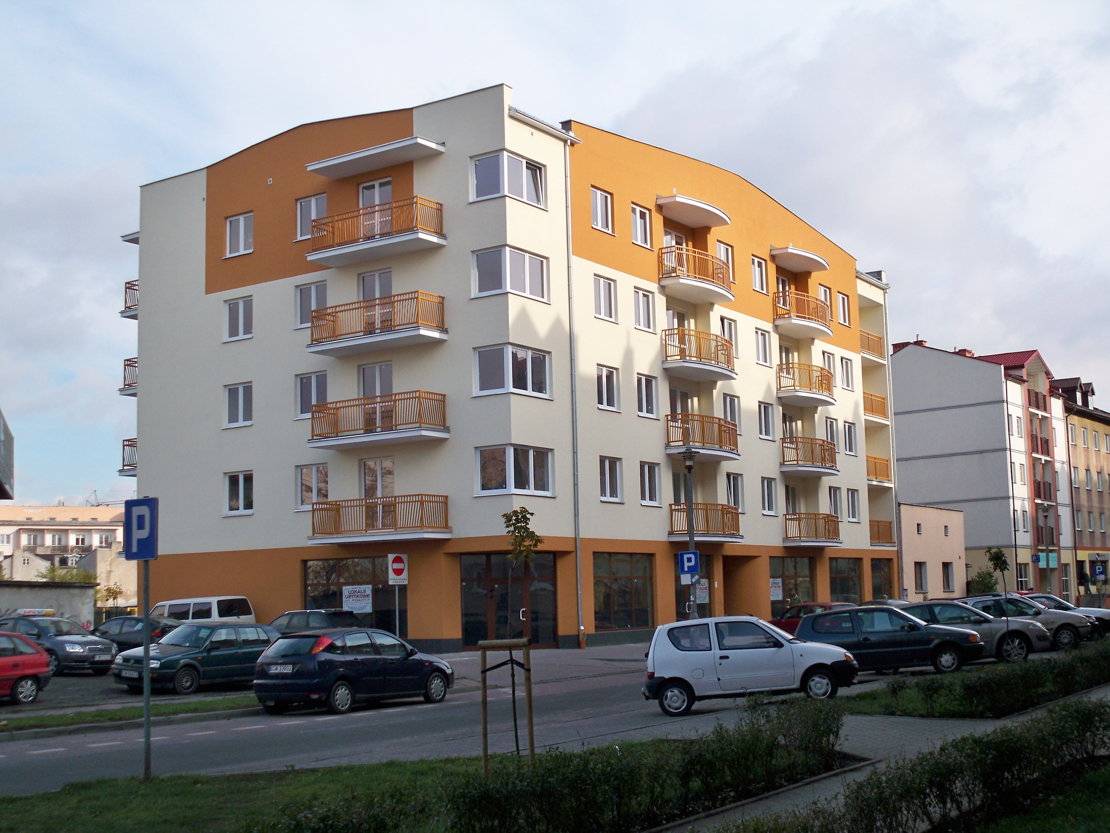 Budowa budynku przy ul.Reja 16/18 we Włocławku (2009 r.)